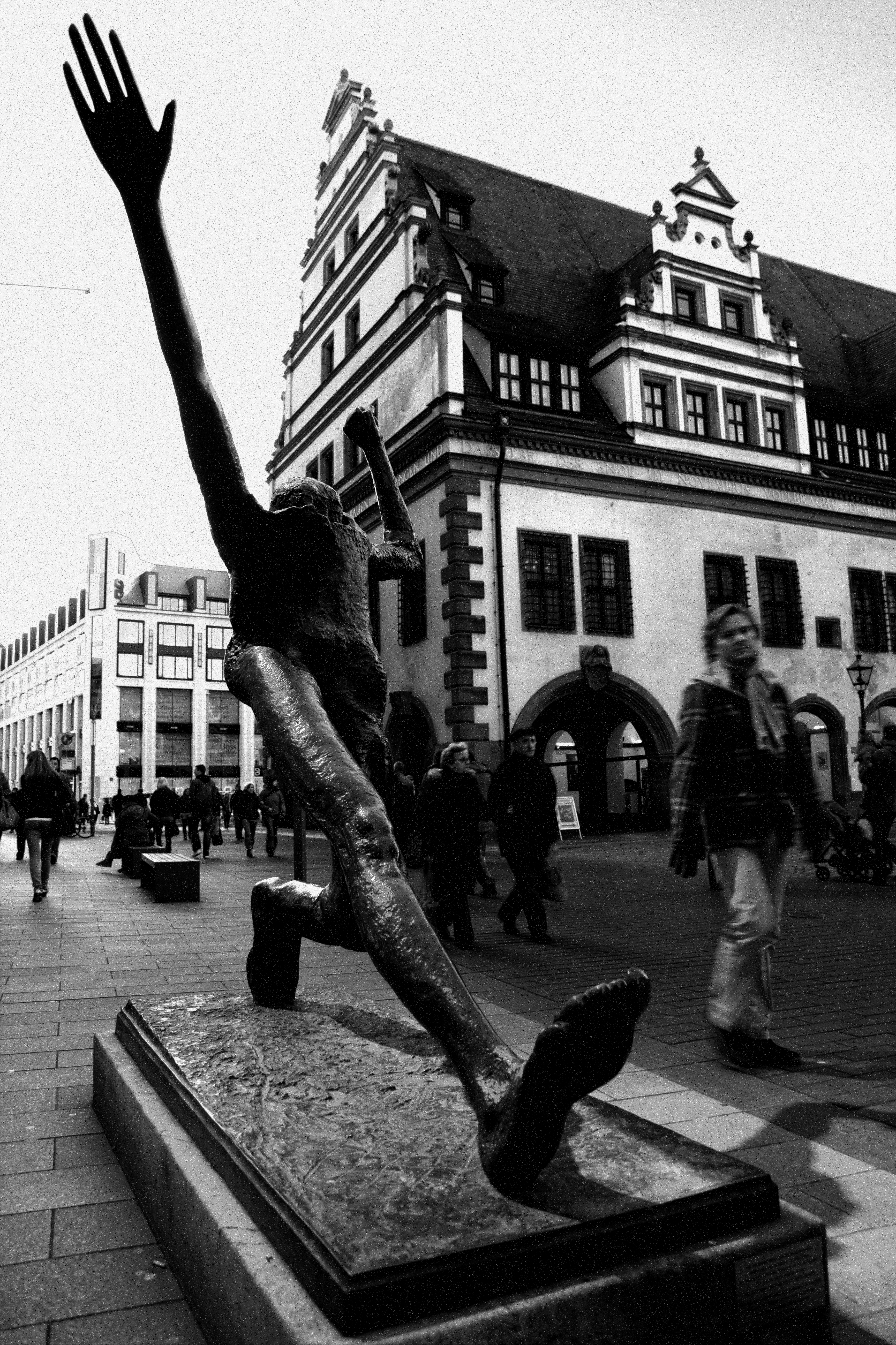 Skulptur vor dem Zeitgeschichtlichen Forum Leipzig; Bildrauschen ist als künstlerischer Effekt gewollt.